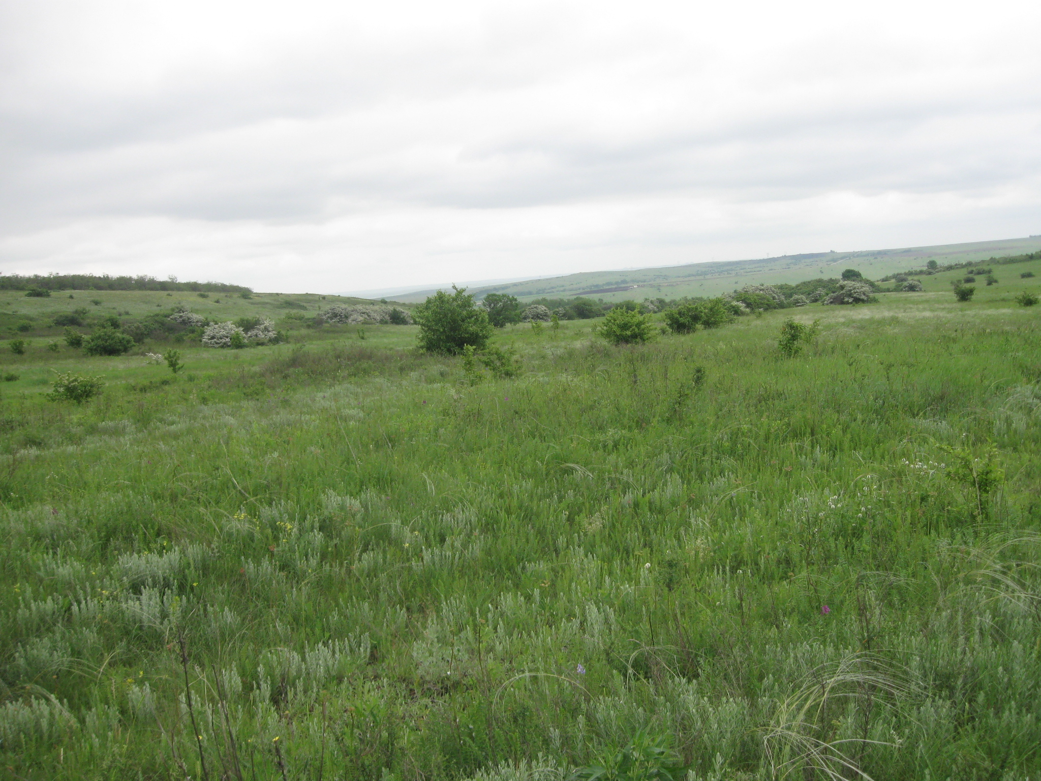 Відділення «Провальський степ»